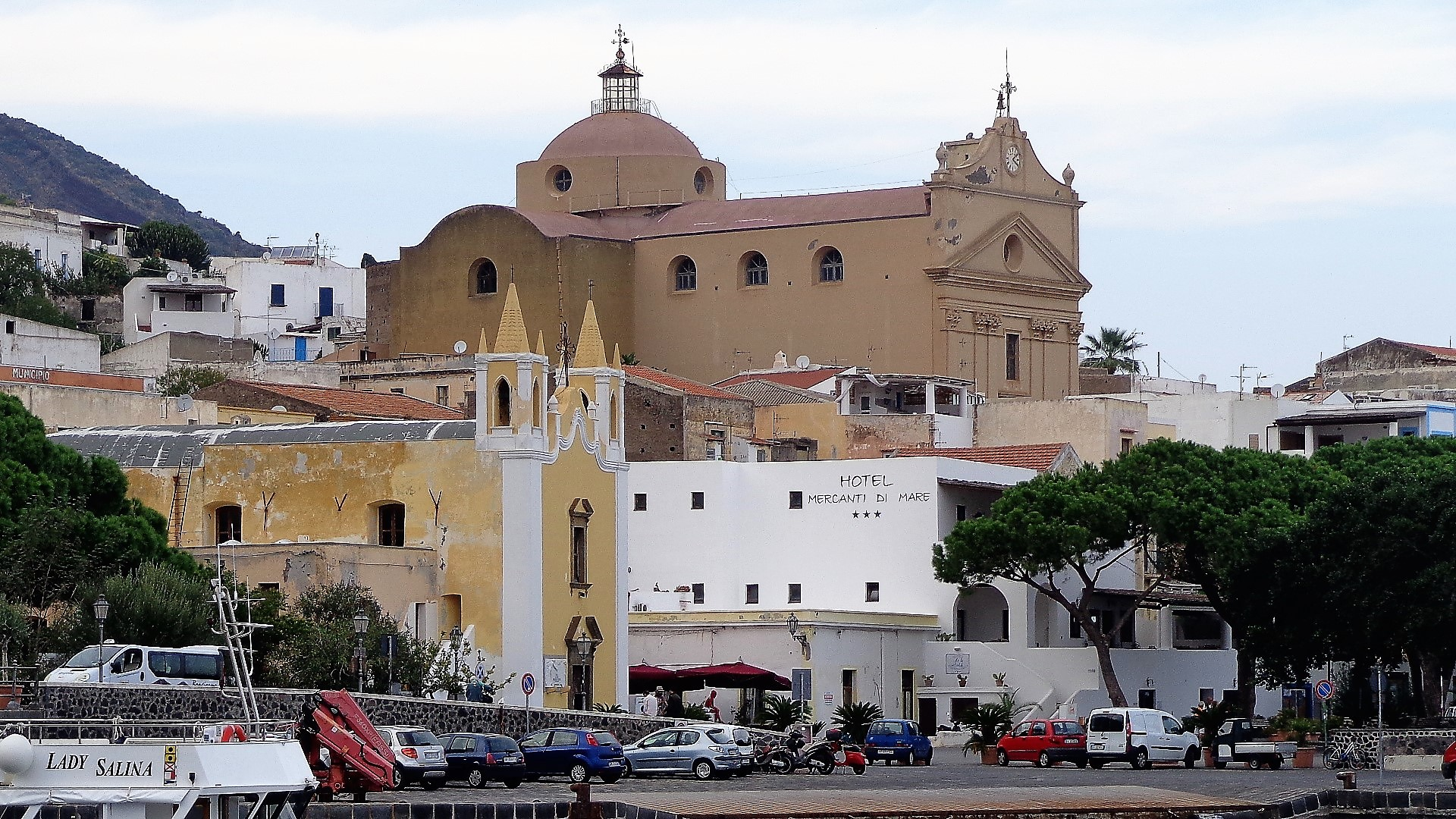 Panorama